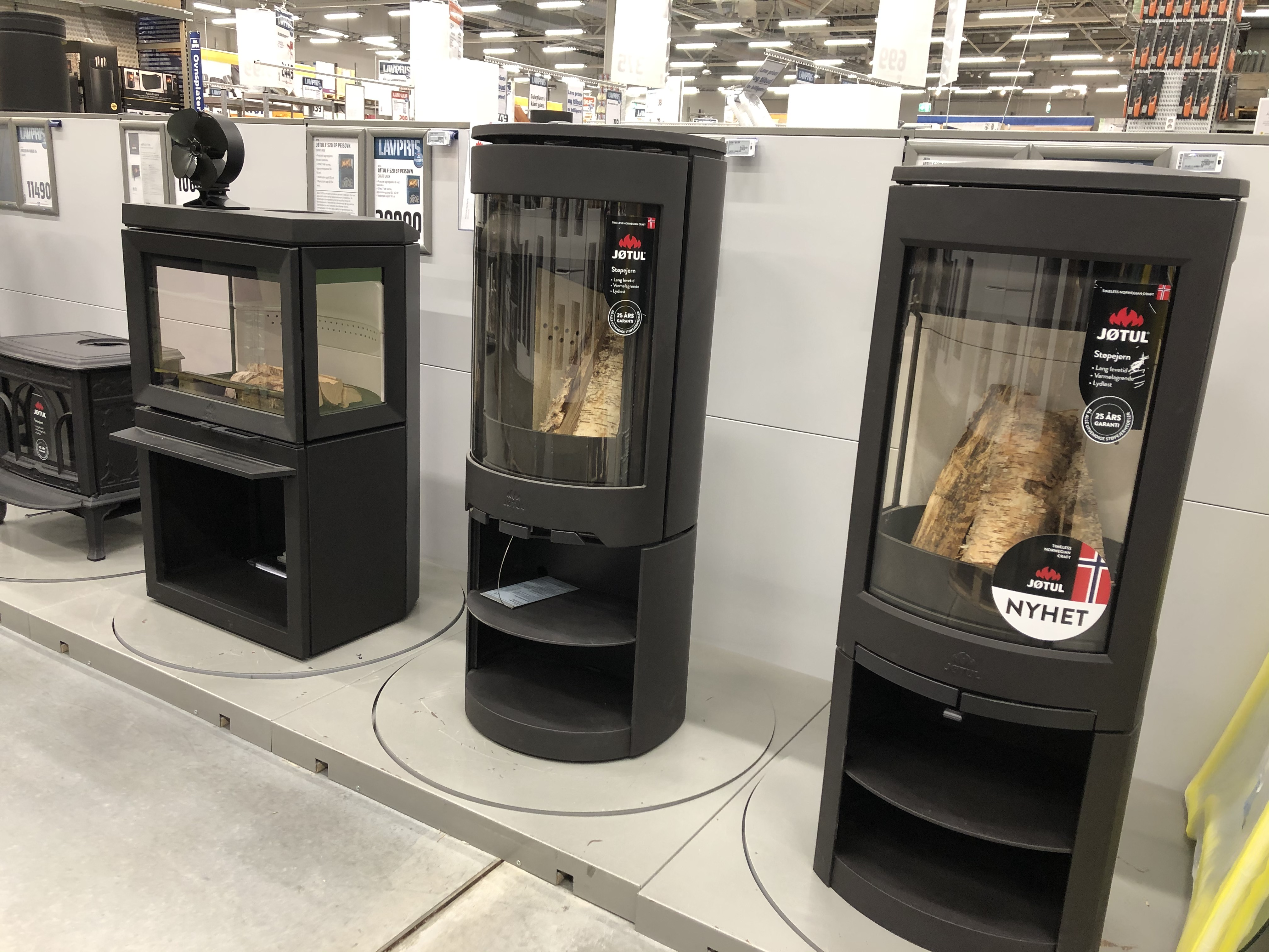 Jøtul peisovner, 2020.